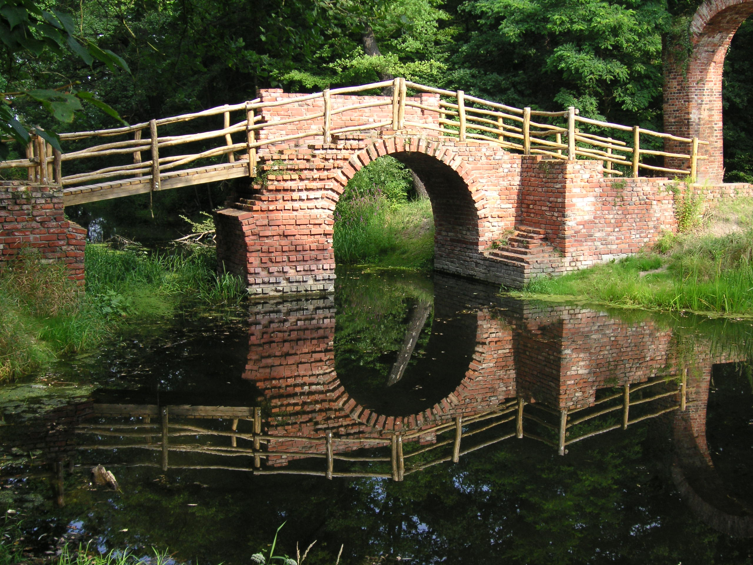 Georgengarten in Dessau, Germany - Ruinenbrücke Beckerbruch.